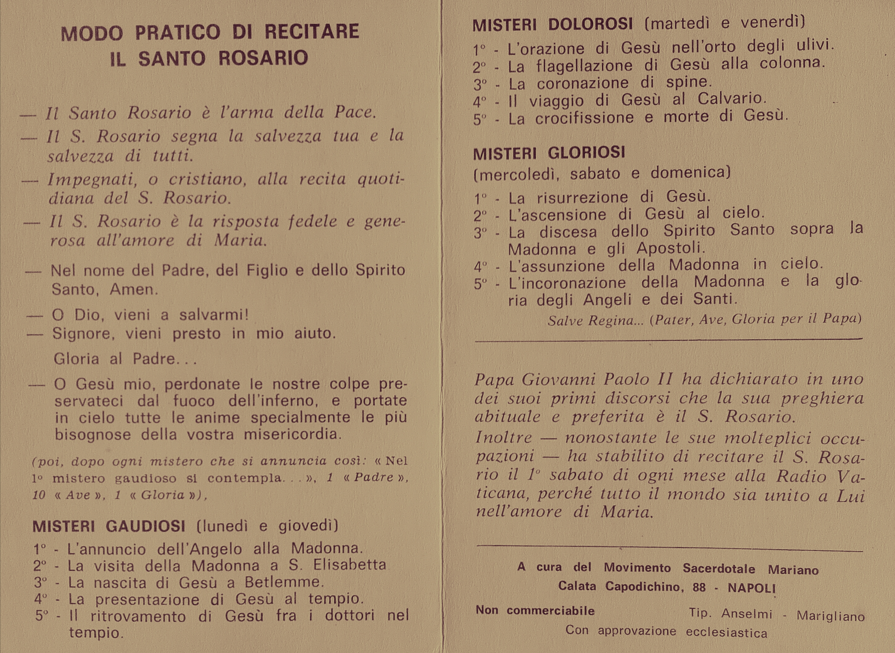 Modo di recitare il santo Rosario, prima dell'introduzione dei Misteri della Luce da parte di Giovanni Paolo II